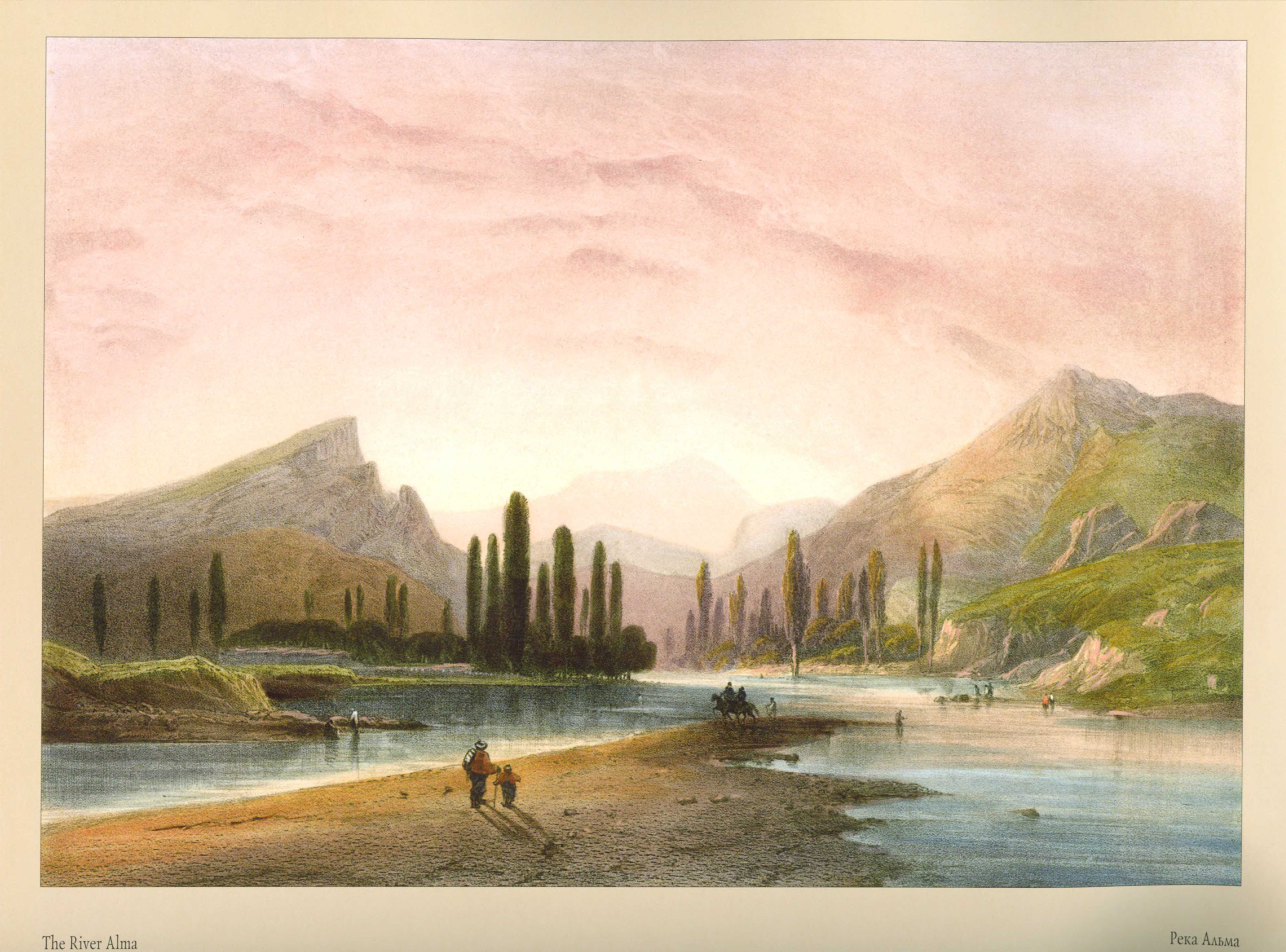 Карло Боссоли. Река Альма